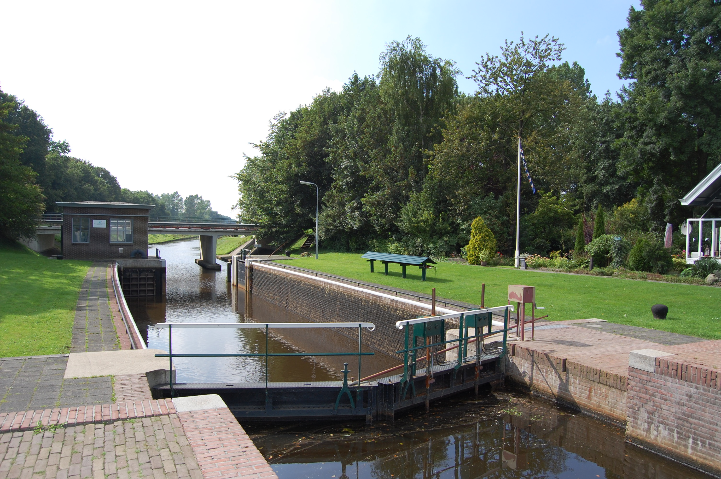 Sluis III (nr. 3) in het Tjongerkanaal die toegang geeft tot de Opsterlandse-Compagnonsvaart